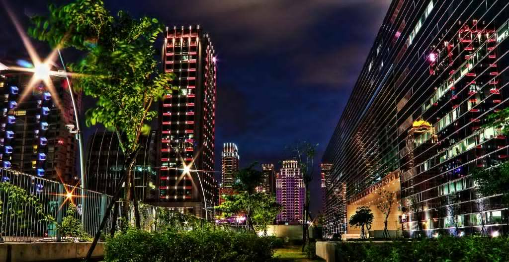 中文（台灣）: 台中七期夜景